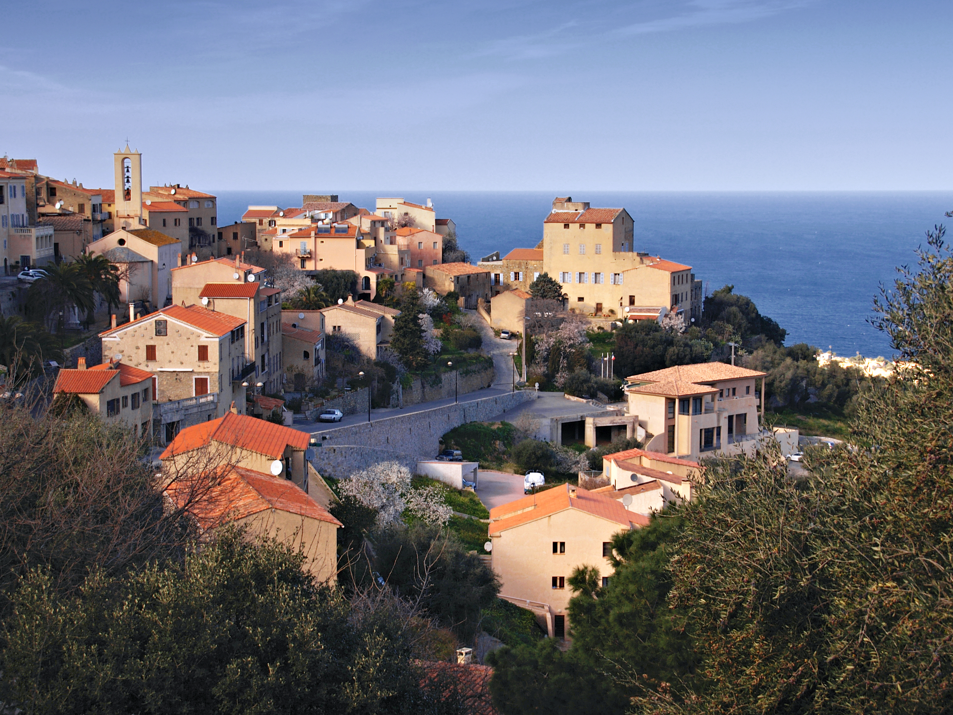 Monticello (Corsica) - Vue du village